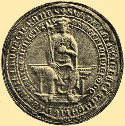 Pečeť Ladislava IV. Kumána